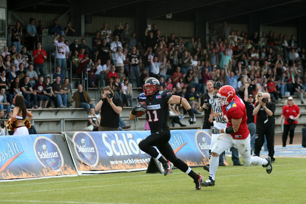 Düsseldorf Panther (First Team 2008 - in Aktion)